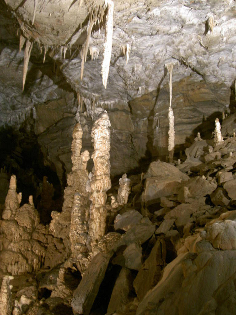 Tropfsteine in der Lurgrotte, selbst fotografiert